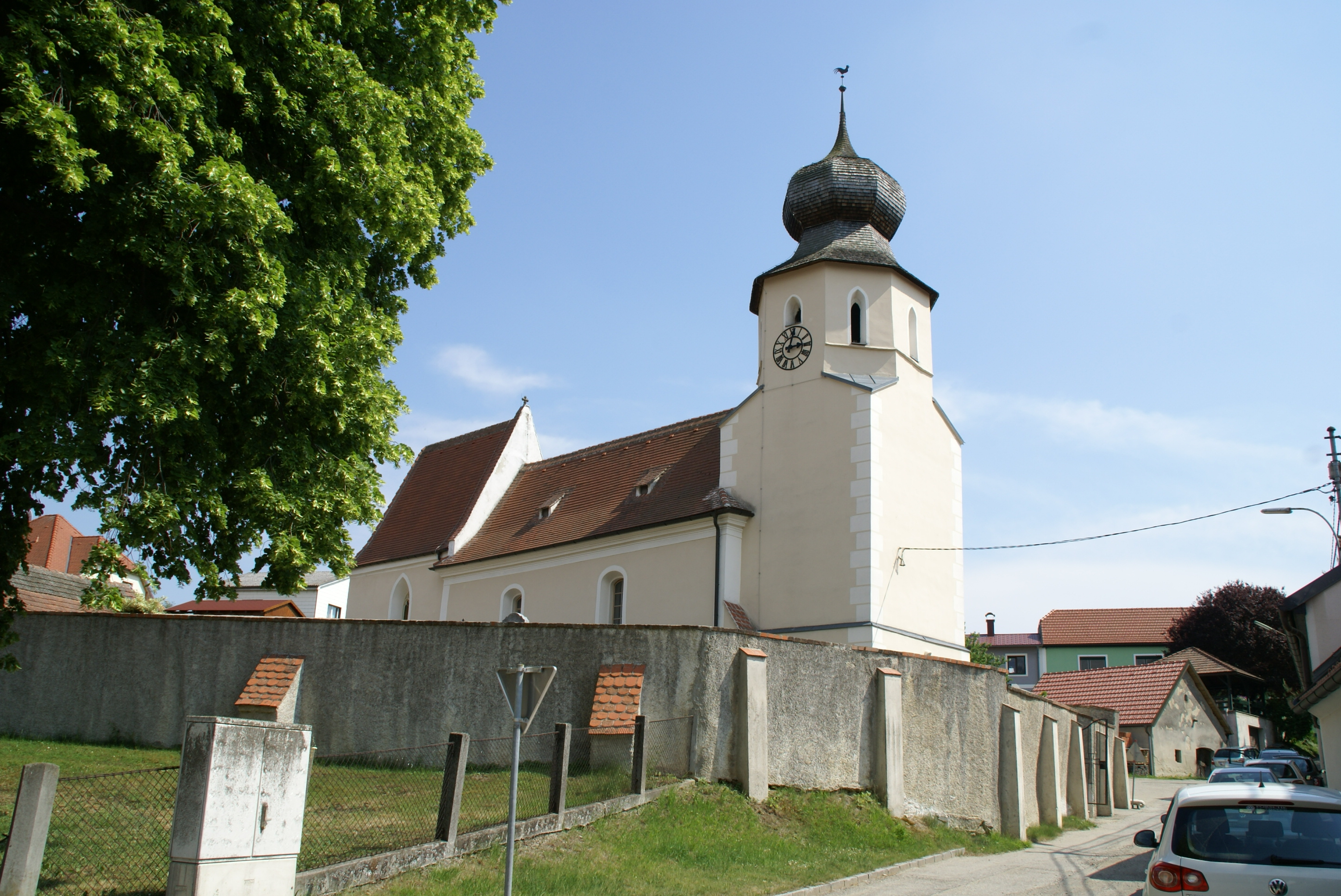 Filialkirche von Kuffern, Pfarre und Gemeinde Statzendorf, Bezirk Sankt Pölten-Land, Niederösterreich